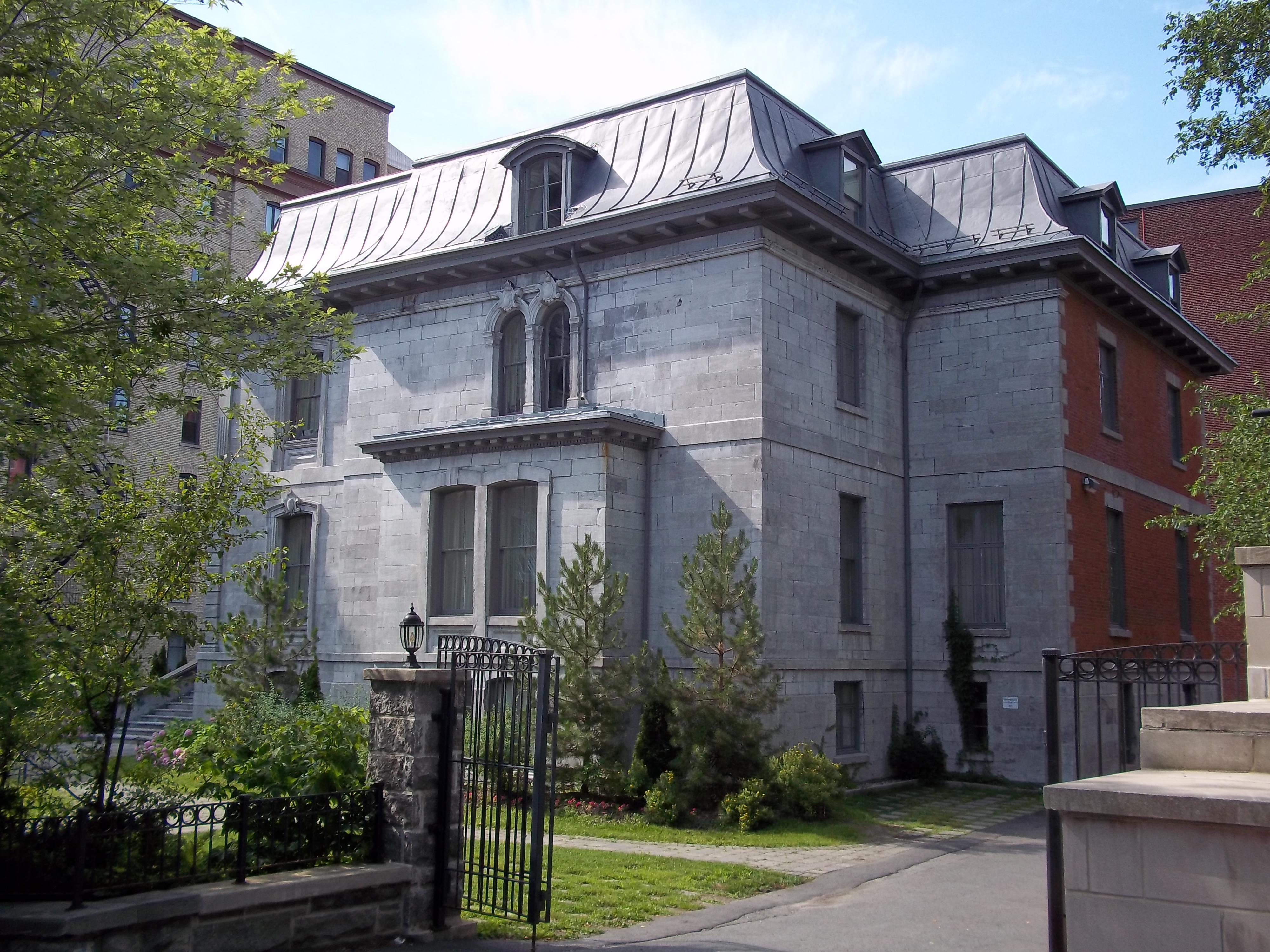 Maison David-Lewis, 3424 rue Simpson, Montréal